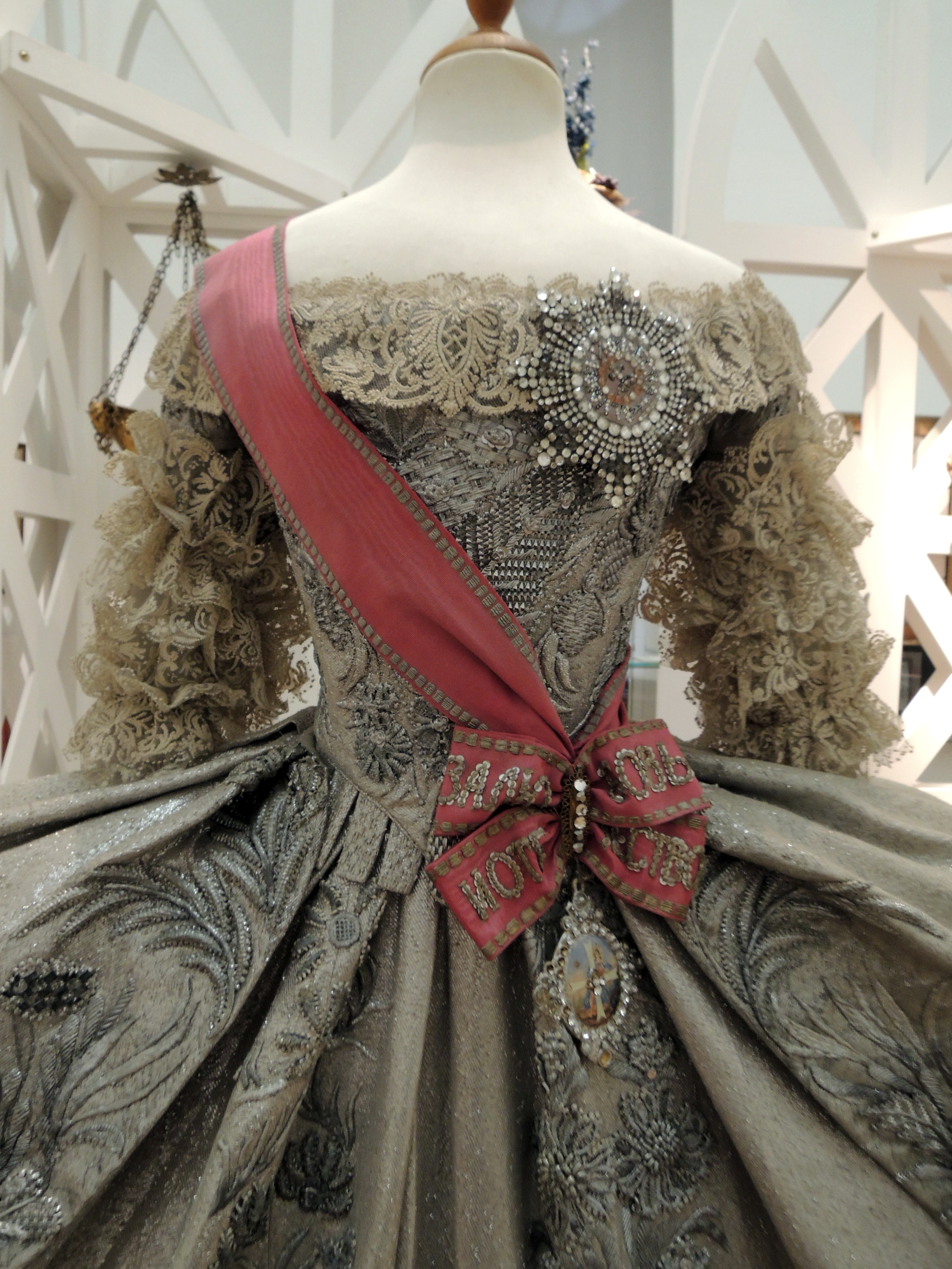 Венчальное платье великой княгини Екатерины Алексеевны (будущей императрицы Екатерины II). Реплика с оригинала 1745 года в Оружейной палате. Изготовлена: кафедра сценического костюма, Школа-Студия МХТ. Глава кафедры - Элеонора Петровна Маклакова